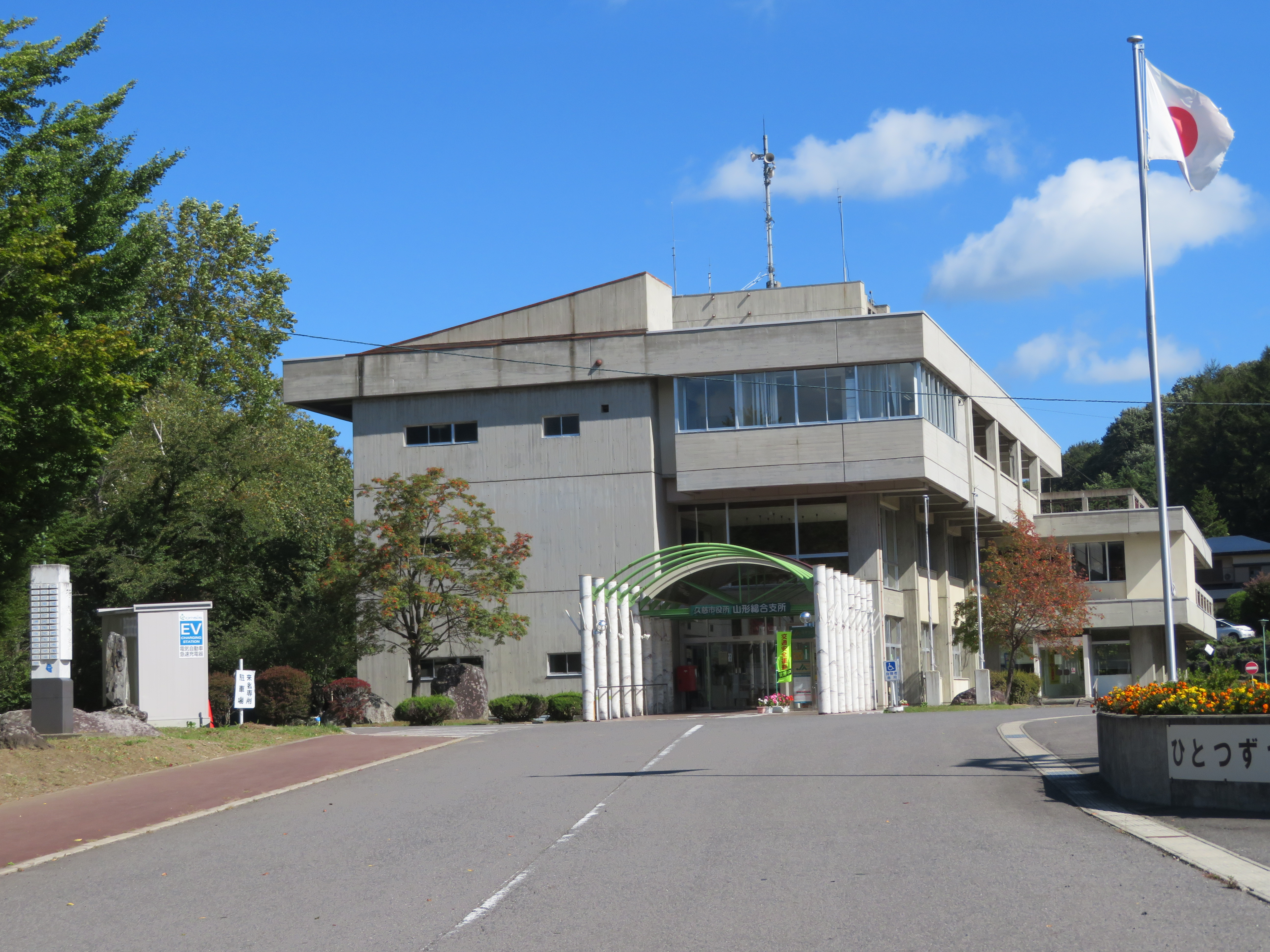 久慈市役所山形総合支所庁舎（旧山形村役場庁舎）